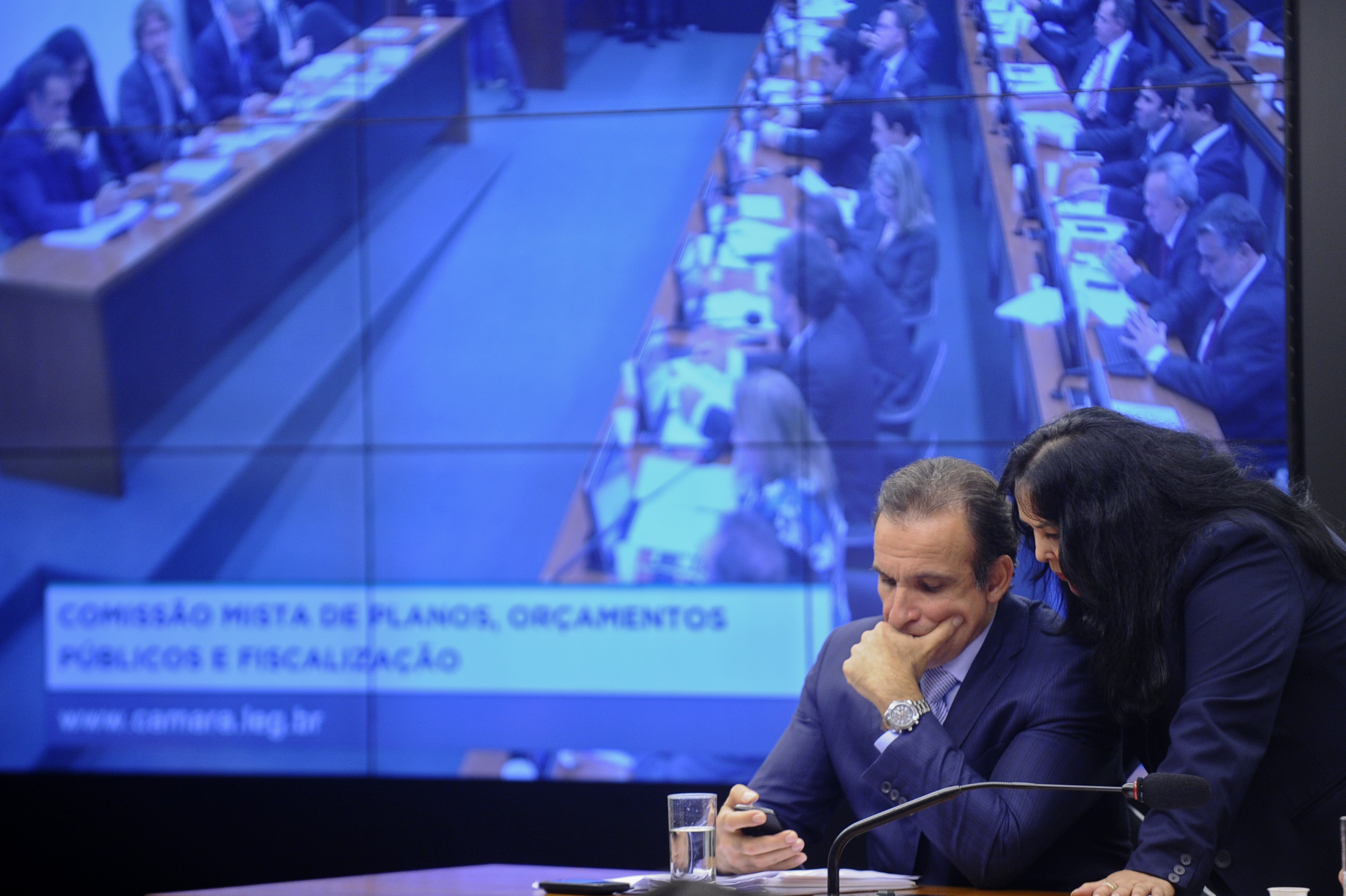 Comissão Mista de Planos, Orçamentos Públicos e Fiscalização (CMO) realiza reunião para apreciar, entre outros itens, o Projeto de Lei Orçamentária para 2016 (PLN 7/2015). Mesa: deputado federal Hugo Leal (PSC-RJ); senadora Rose de Freitas (PMDB-ES). Foto: Marcos Oliveira/Agência Senado.